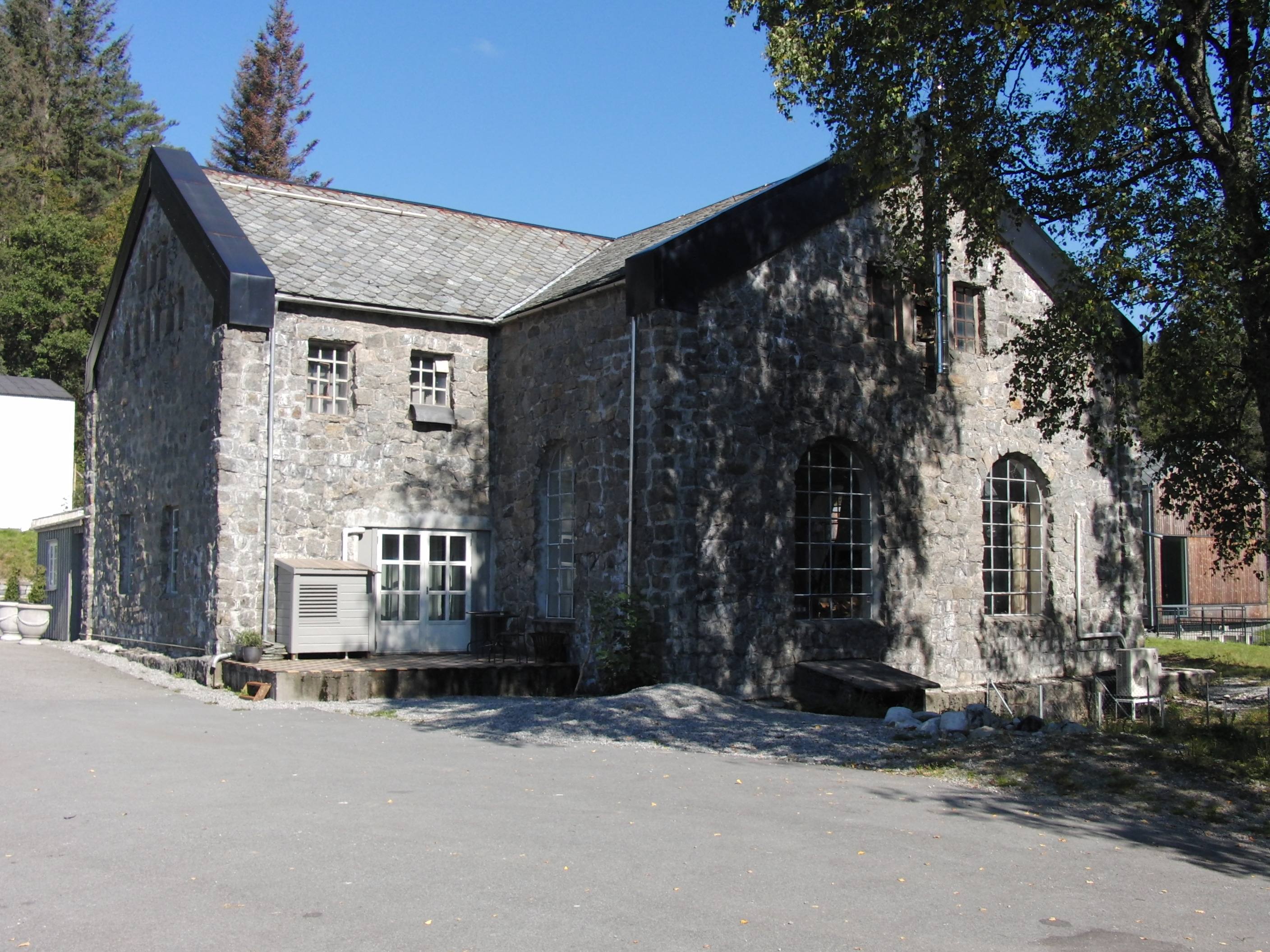 Jørpeland II kraftverk